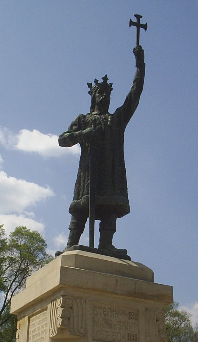 Stefancelmare.jpg